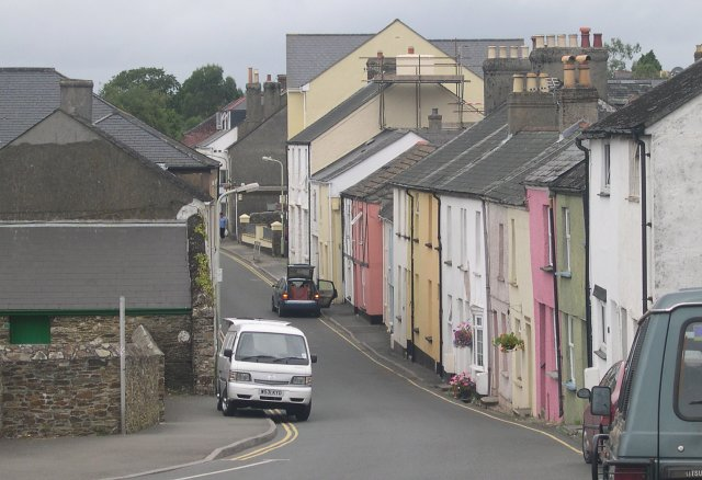 Bere Alston